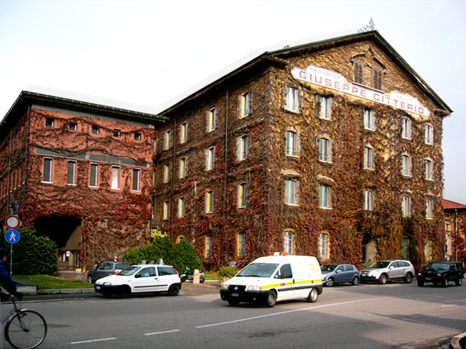 La sede della Citterio Spa a Rho